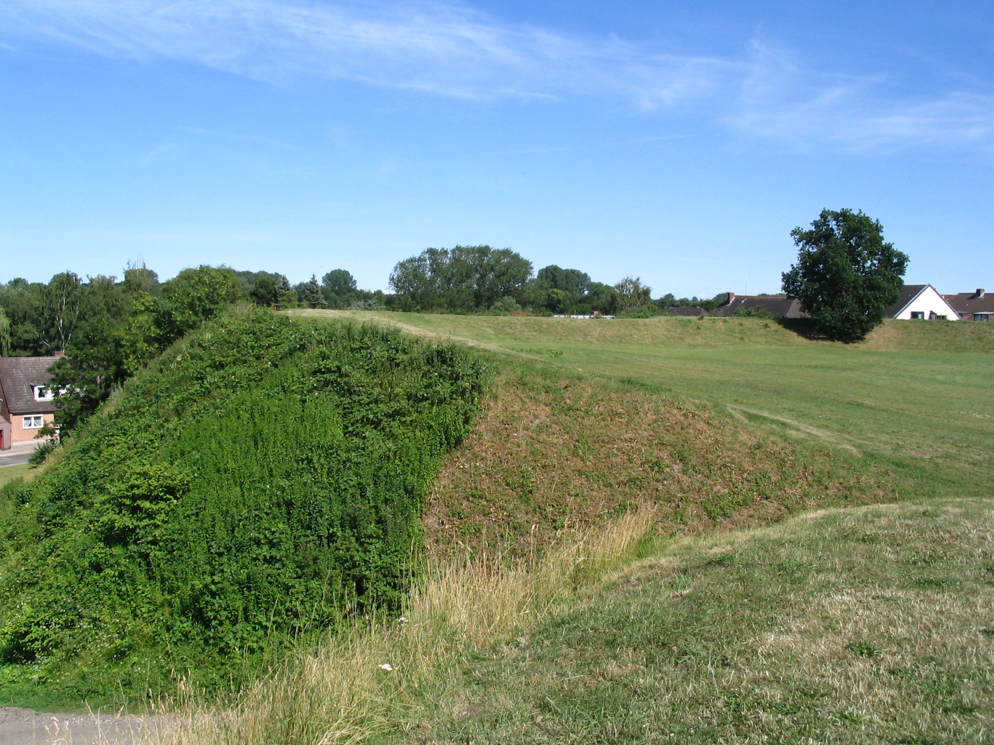 Wallanlage aus der Slavenzeit, Stadtgebiet Oldenburg in Holstein